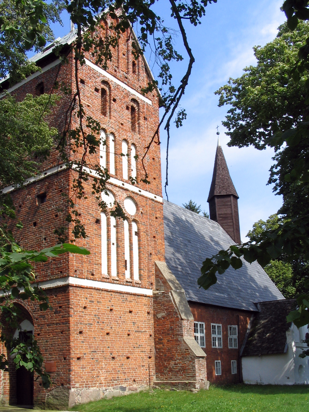 Krupy - kościół pw. MB. Ostrobramskiej (zabytek nr rejestr. 402)